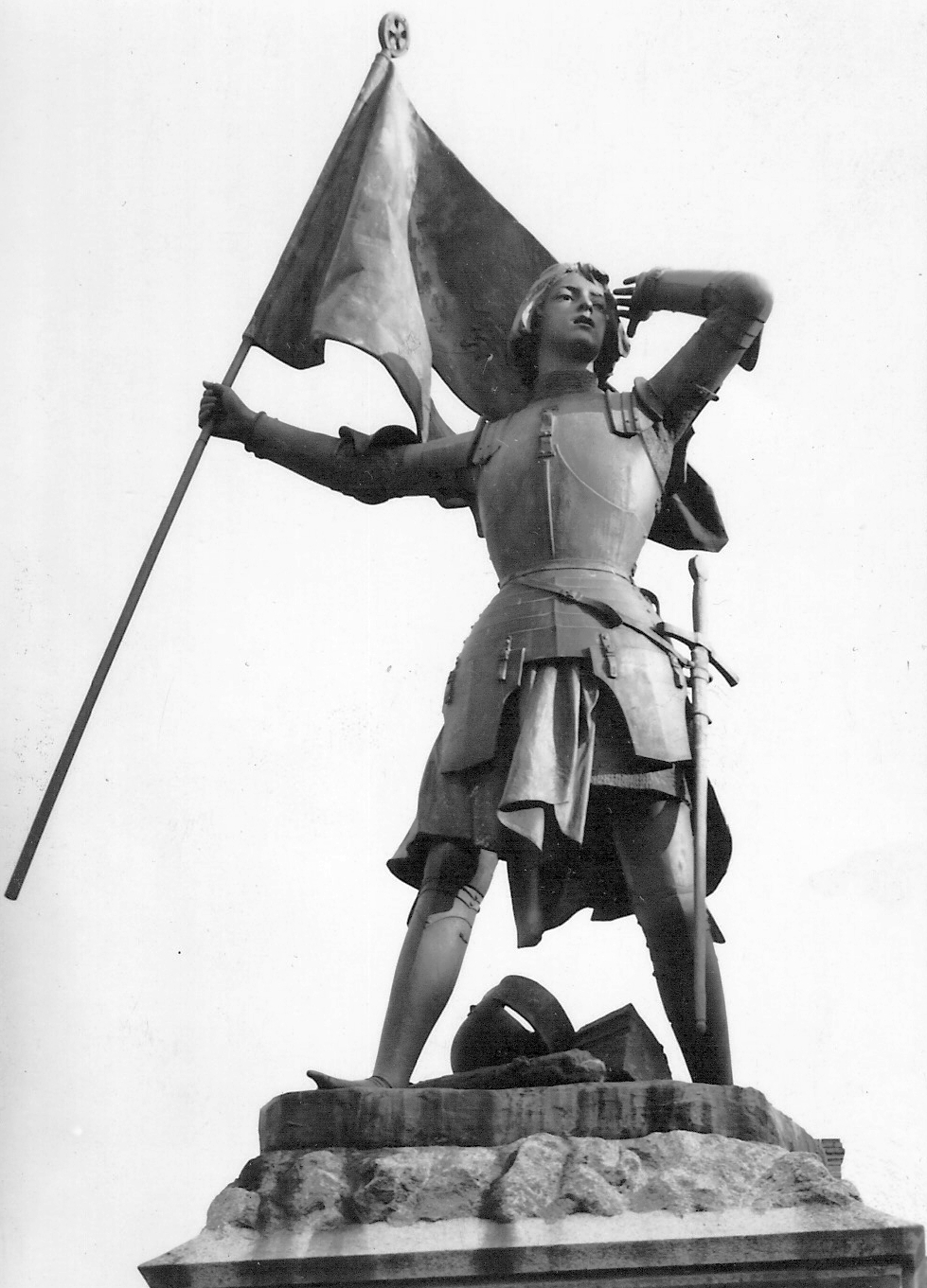 Alfred-Désiré Lanson (Français, 1851-1898): Jeanne d'Arc blessée à la bataille de Jargeau, bronze, 1895, mise en place en 1898, signée sur la plinthe Lanson 1895 et Leblanc Barbedienne/Fondeur Paris/offert par Mme Georges Dupuis, inscription sur le devant du piédestal A Jeanne d'Arc/12 juin 1429/1898. Carte postale illustrant la statue en pied en armure portant un étendard élevée sur la Place du Martroi, Jargeau, Loiret, France. [1]